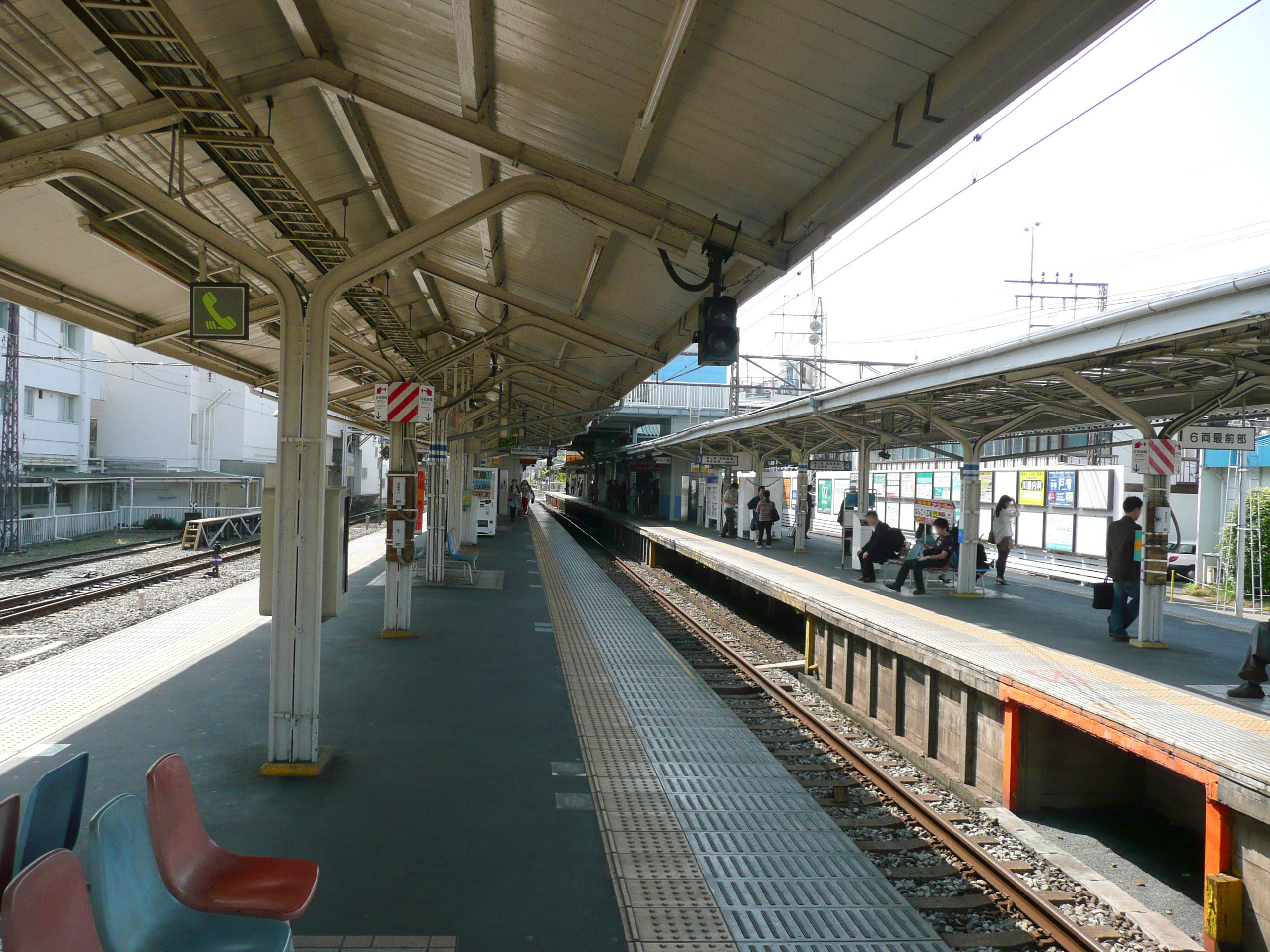 上石神井駅ホーム